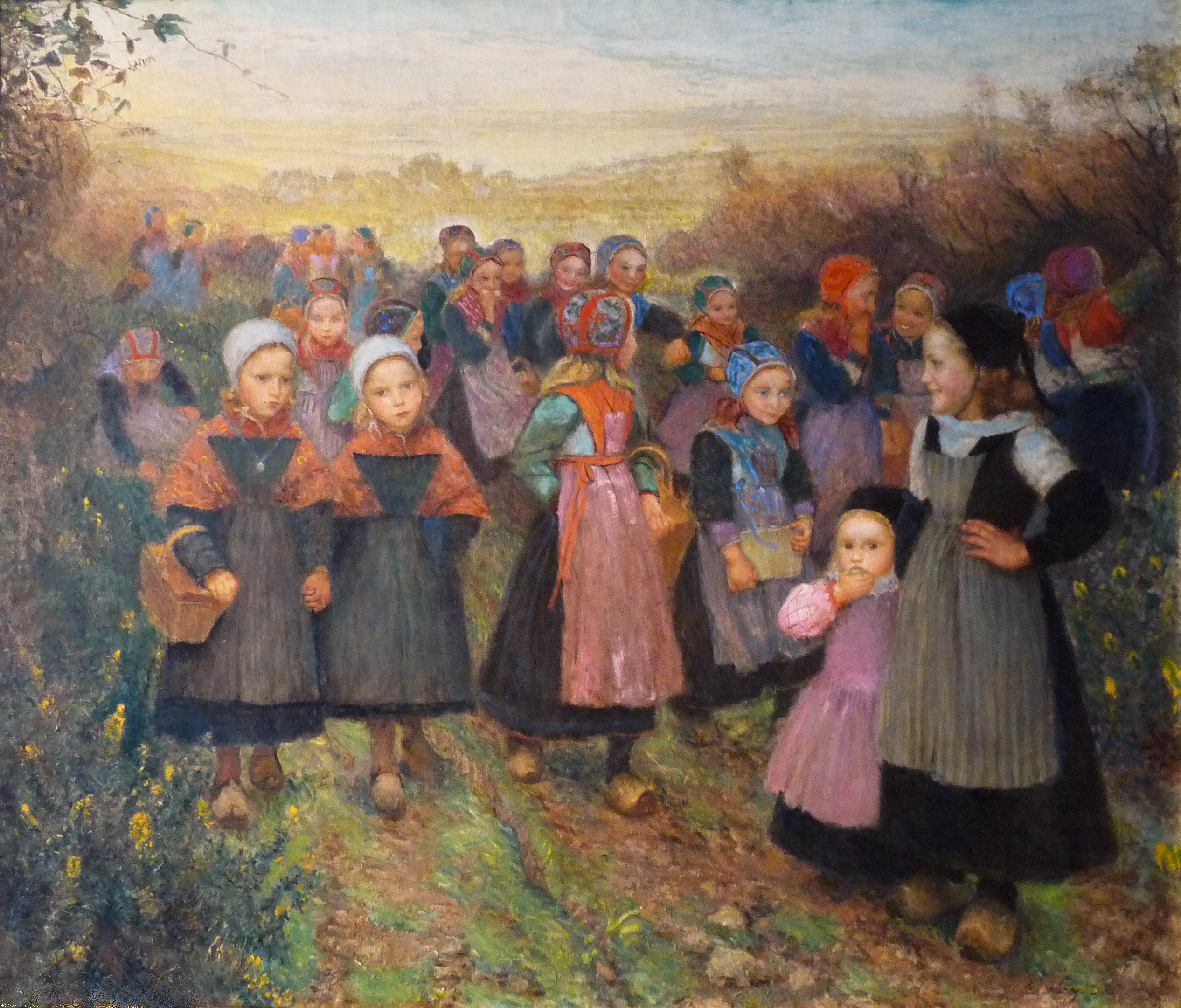 Emile Wery (1868-1935) : Retour d'école à Plougastel (Musée des beaux-arts de Reims)